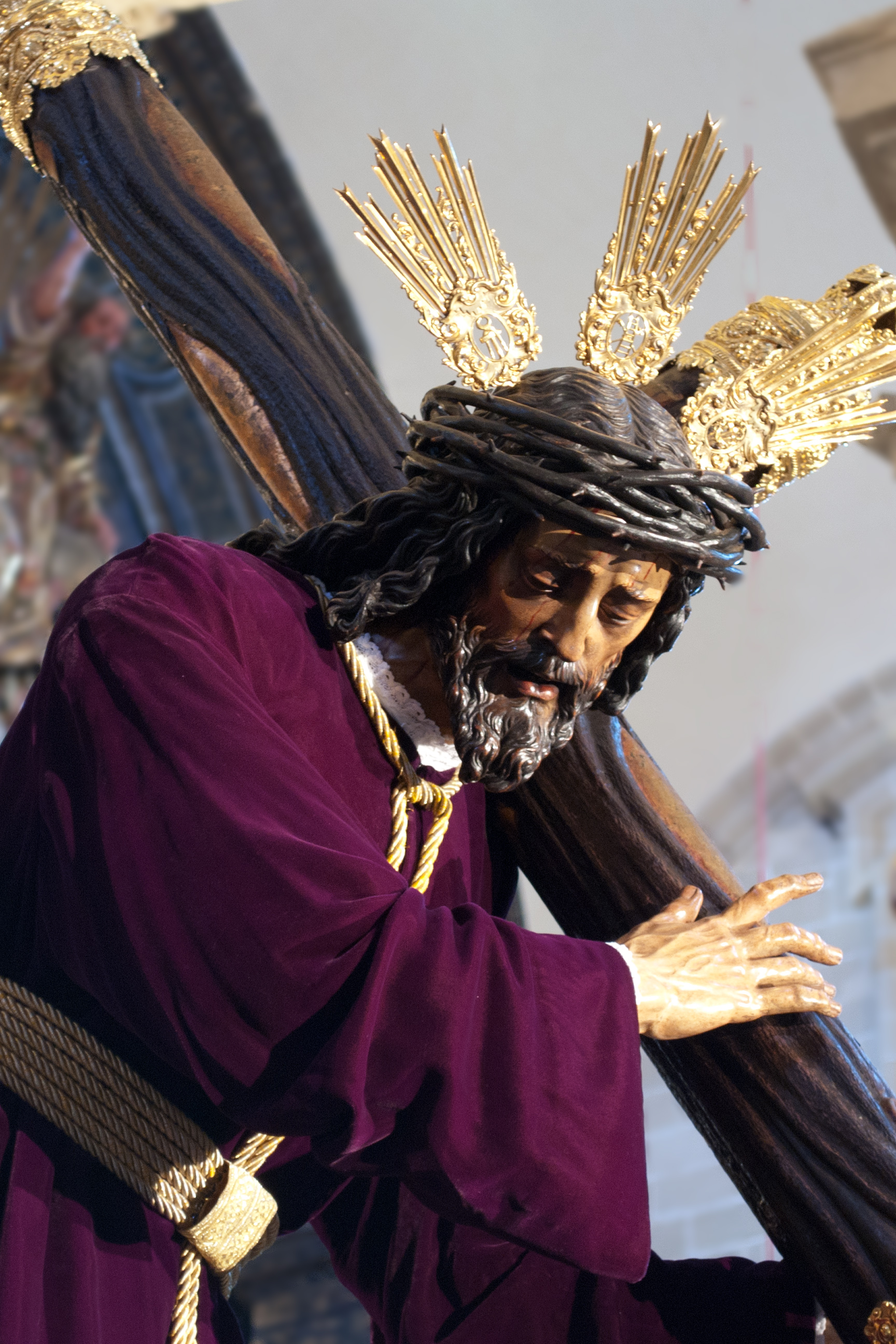 Nuestro Padre Jesús de la Pasión. Hermandad de Pasión, Semana Santa de Sevilla. Obra de Juan Martínez Montañes, año 1619.